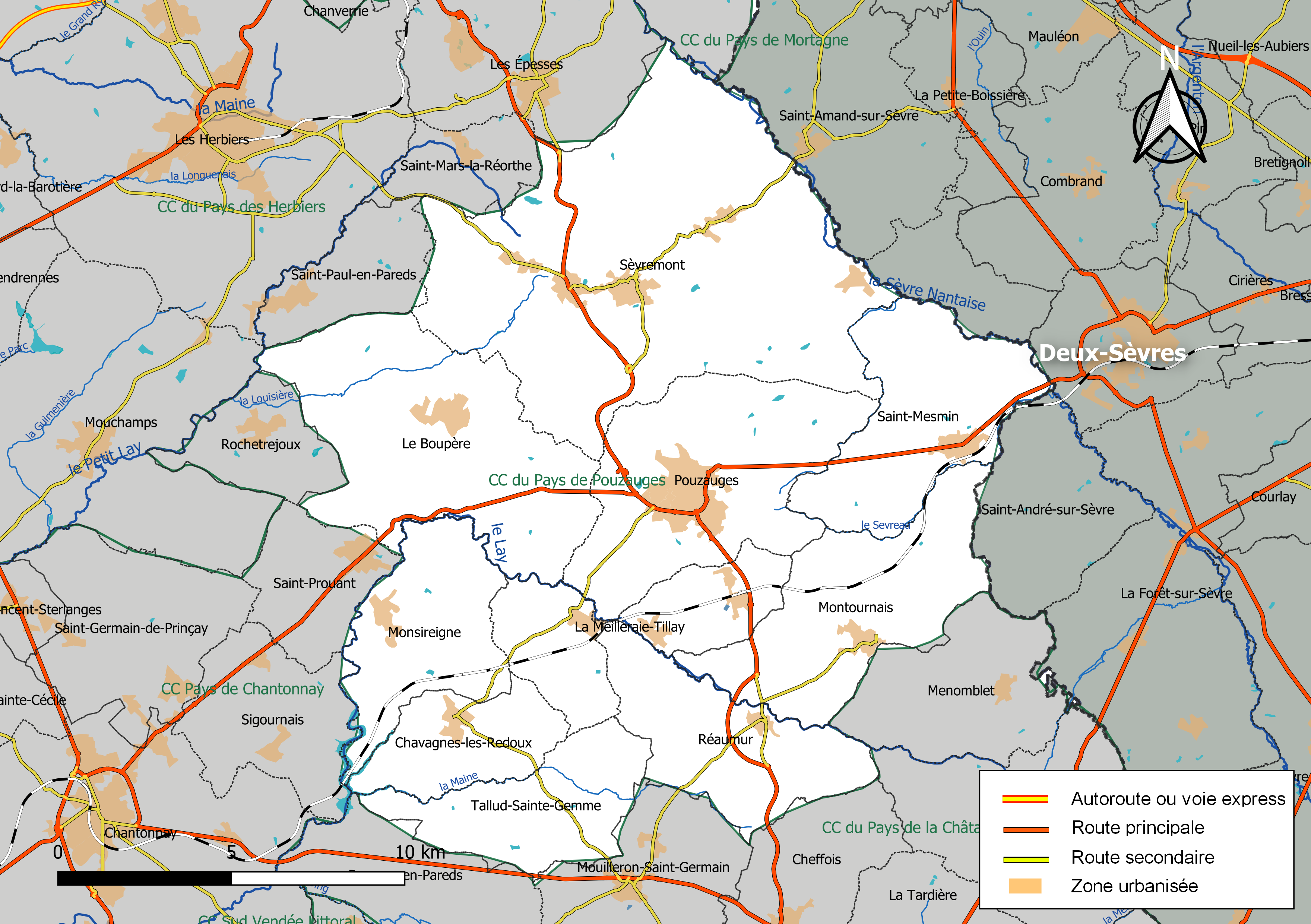 Carte géographique de la Communauté de communes du Pays de Pouzauges, département de la Vendée, France. Composition au 1er janvier 2019.